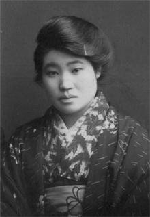 権藤 花代（ごんどう はなよ） 1899年（明治32年）4月13日 - 1961年（昭和36年）11月3日 童話作家、童謡詩人